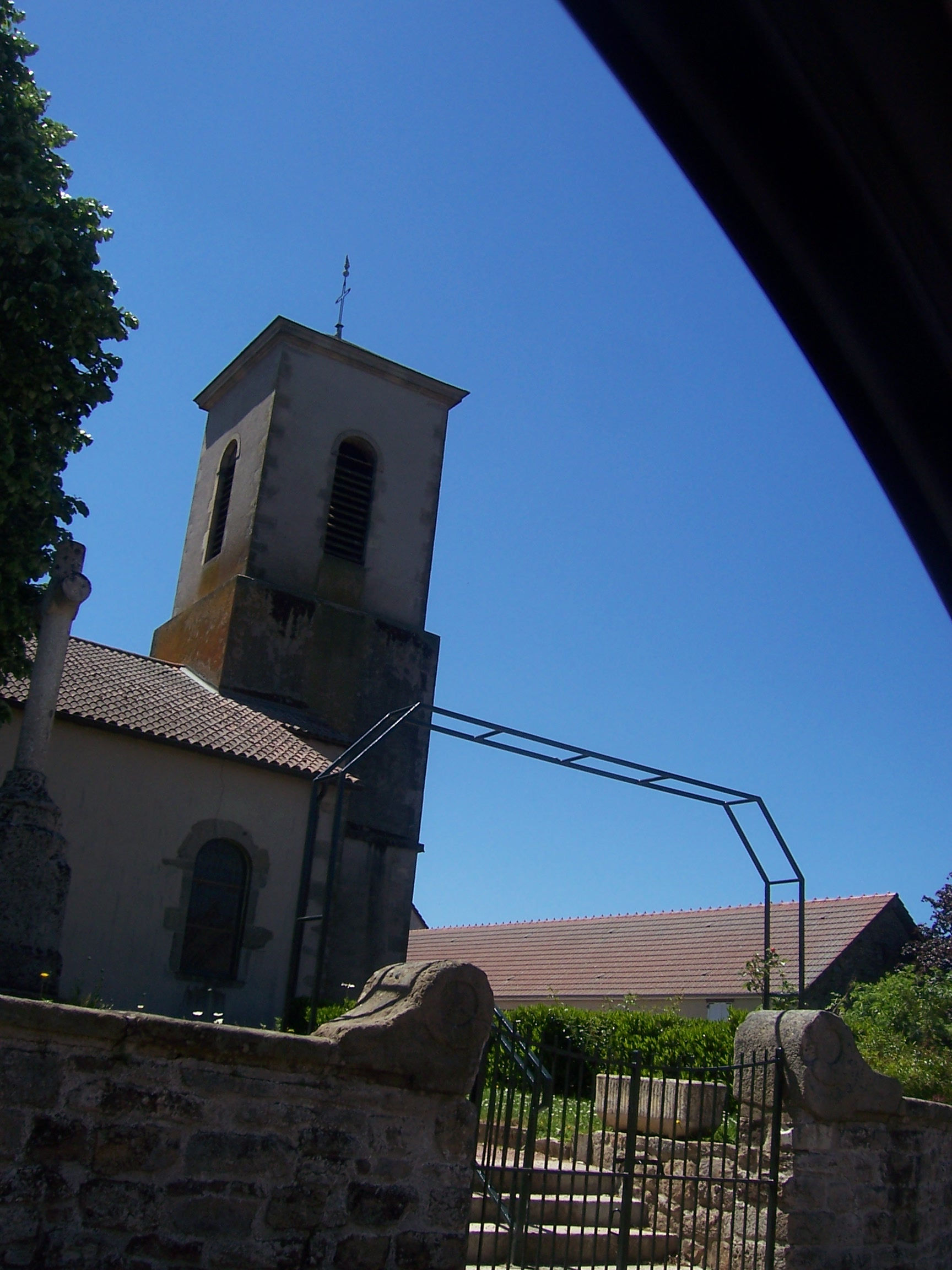 Eglise d'Antully